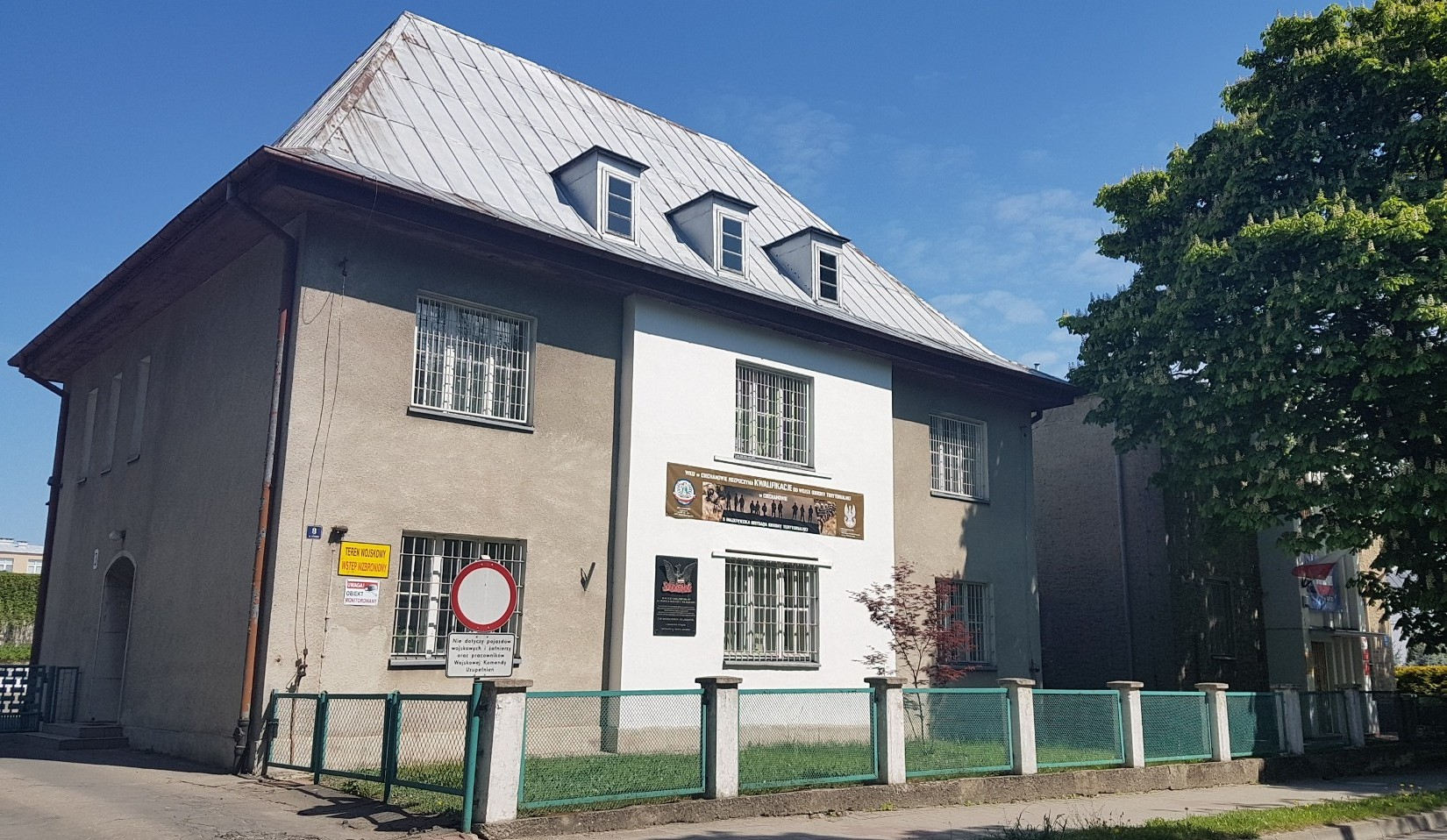 WKU Ciechanów